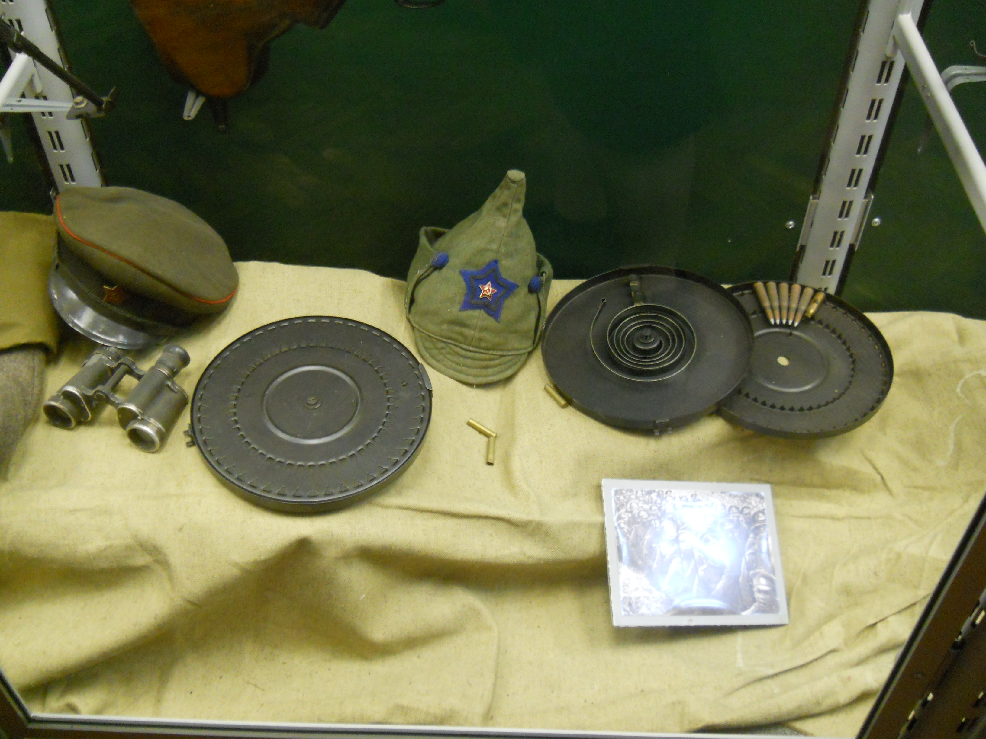 kiev ukraine 966 army museum (11)